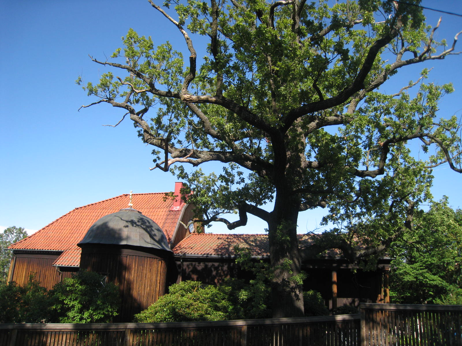 Carl Eldhs ateljémuseum, Bellevueparken, den gamla eken. Byggnaden domineras av de två stora ateljéerna, intill vestibulen placerades ett litet runt rum, ett tusculum, som sticker ut från den rektangulära huskroppen. Det runda rummet har kopparklätt kupoltak och takfönster. Arkitekt var Ragnar Östberg, ateljén var klar 1919. Vid grinden står fortfarande den gamla eken kvar som fanns där när ateljén byggdes 1918-1919.